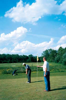 Siemianowickie pole golfowe.